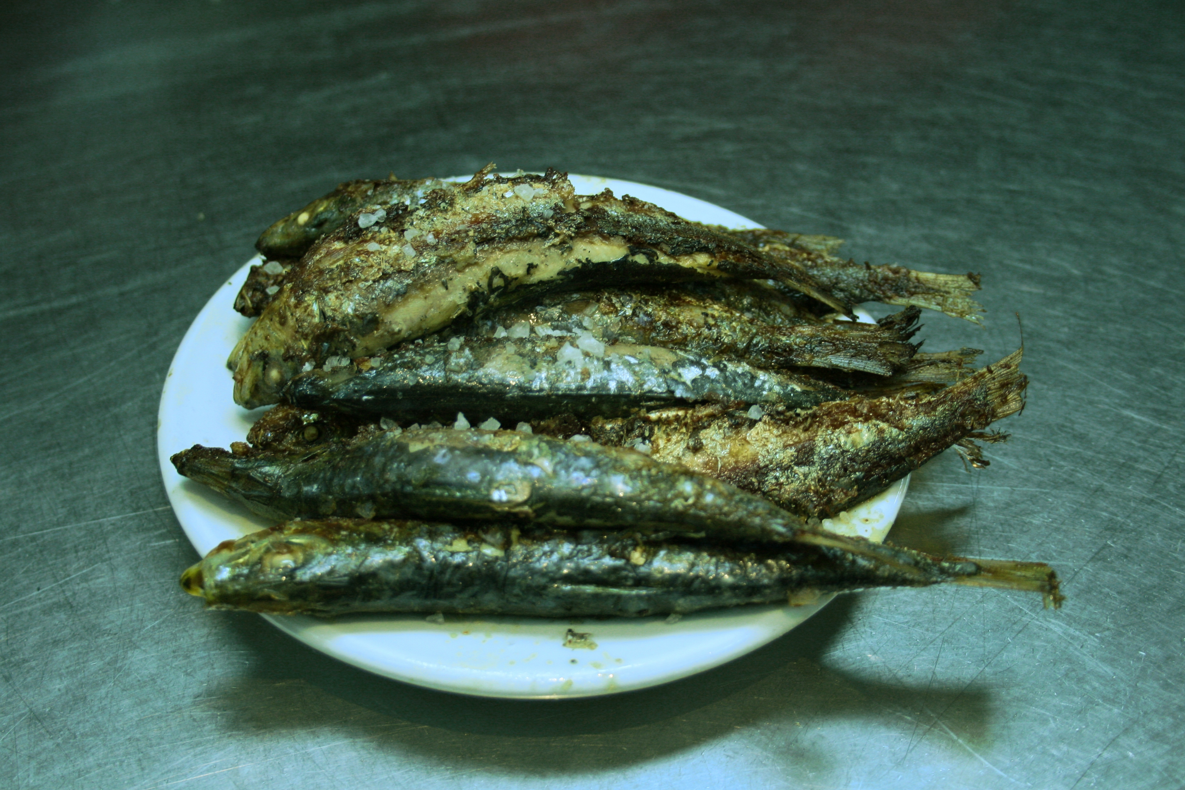 Sardinas a la plancha ... aderezas con granos de sal